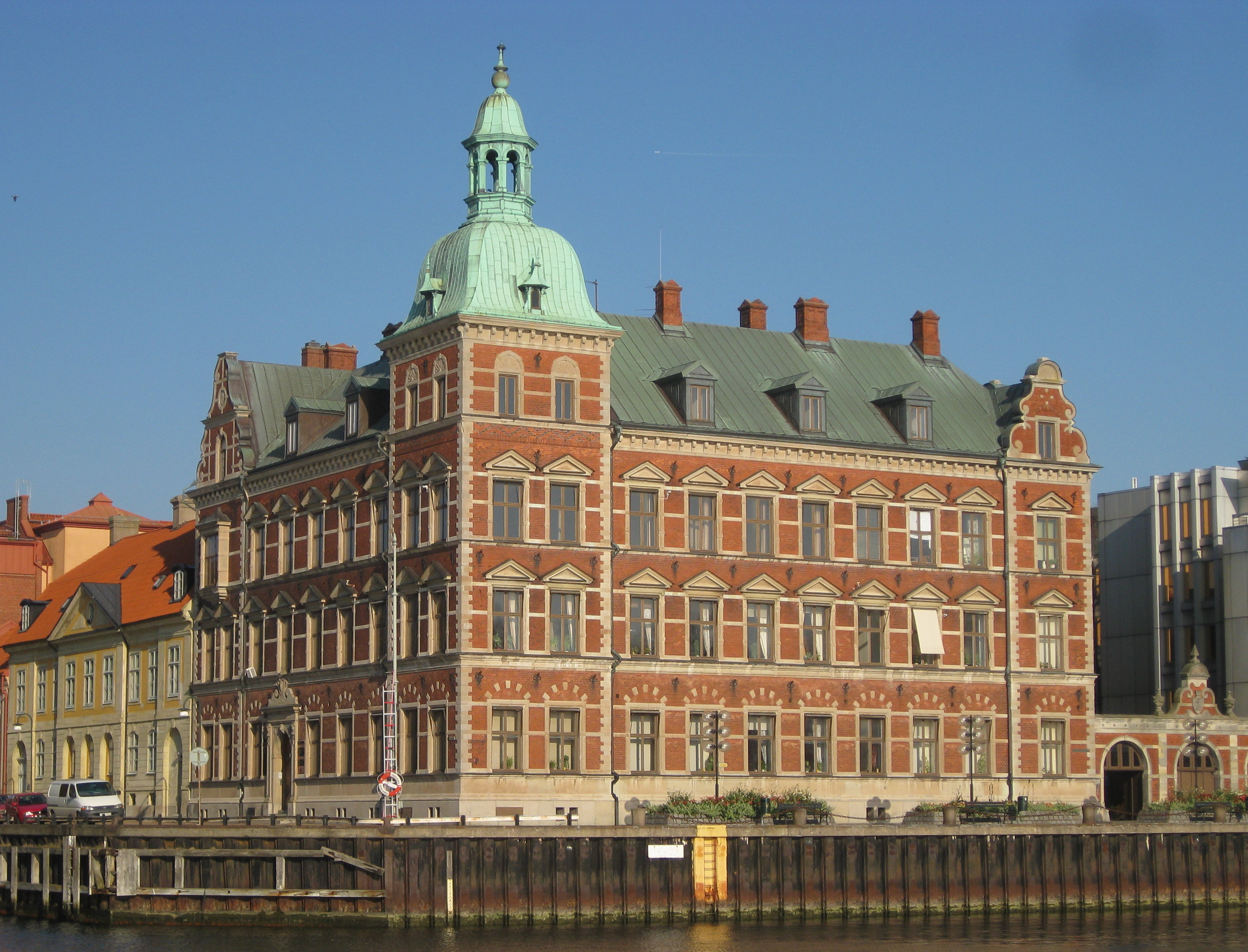 Tranckellska gården, byggnadsminne i Landskrona